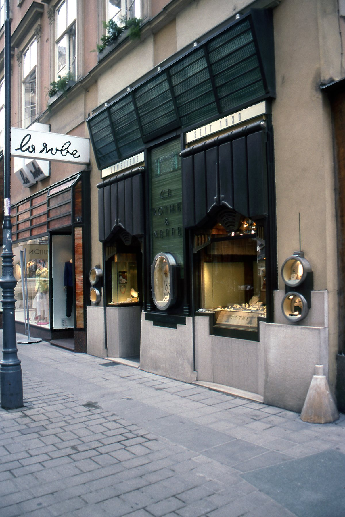 Vienna - Aug 2000 (6)